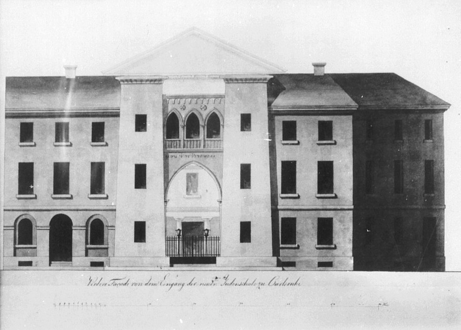 Alte Synagoge, Entwicklung von Weinbrenner Karlsruhe, (1798-1800), 1871 abgebrannt